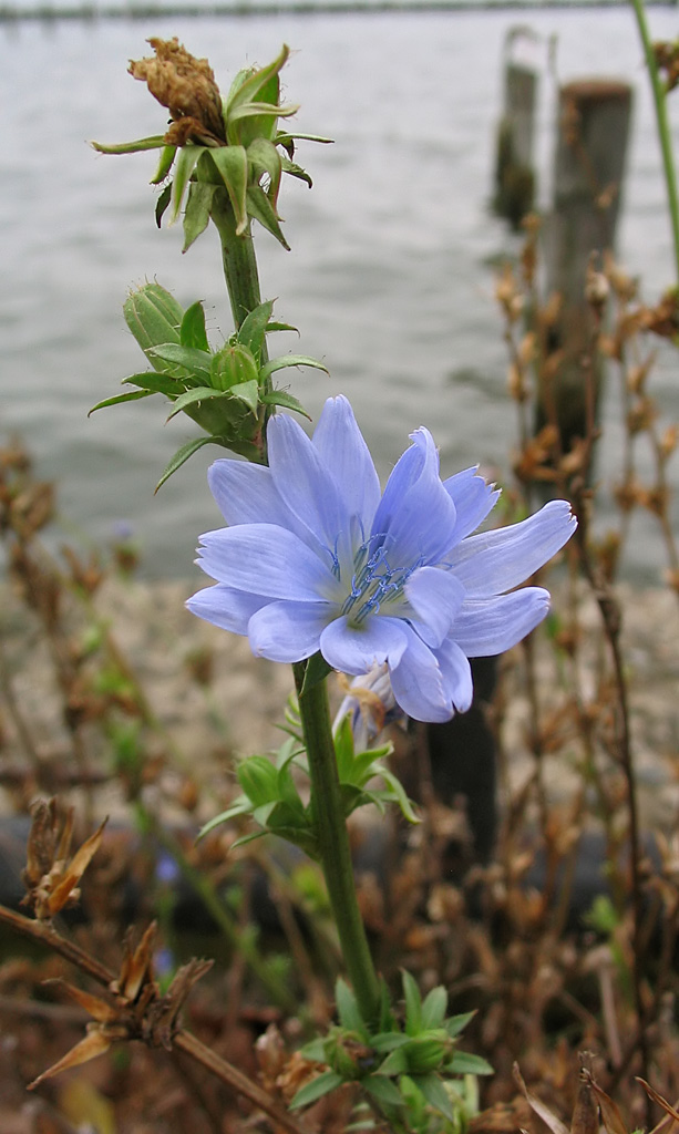 Beschreibung: Wegwarte (Cichorium intybus) Fotograf: Darkone, 3. November 2004 Erstversion: de.wikipedia 00:03, 4. Nov 2004 . . Darkone (209568 Byte)